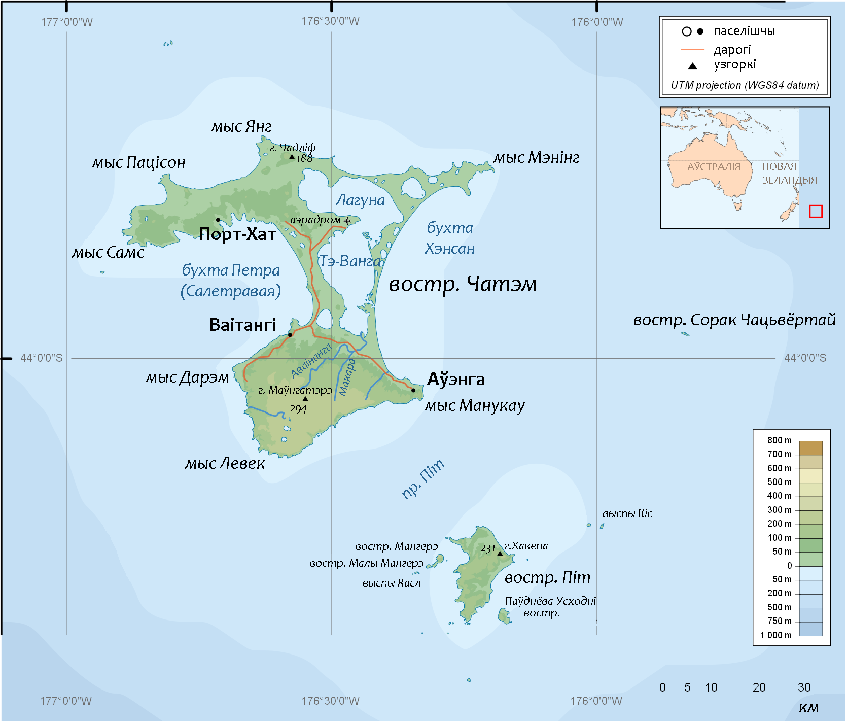 Астравы Чатэм